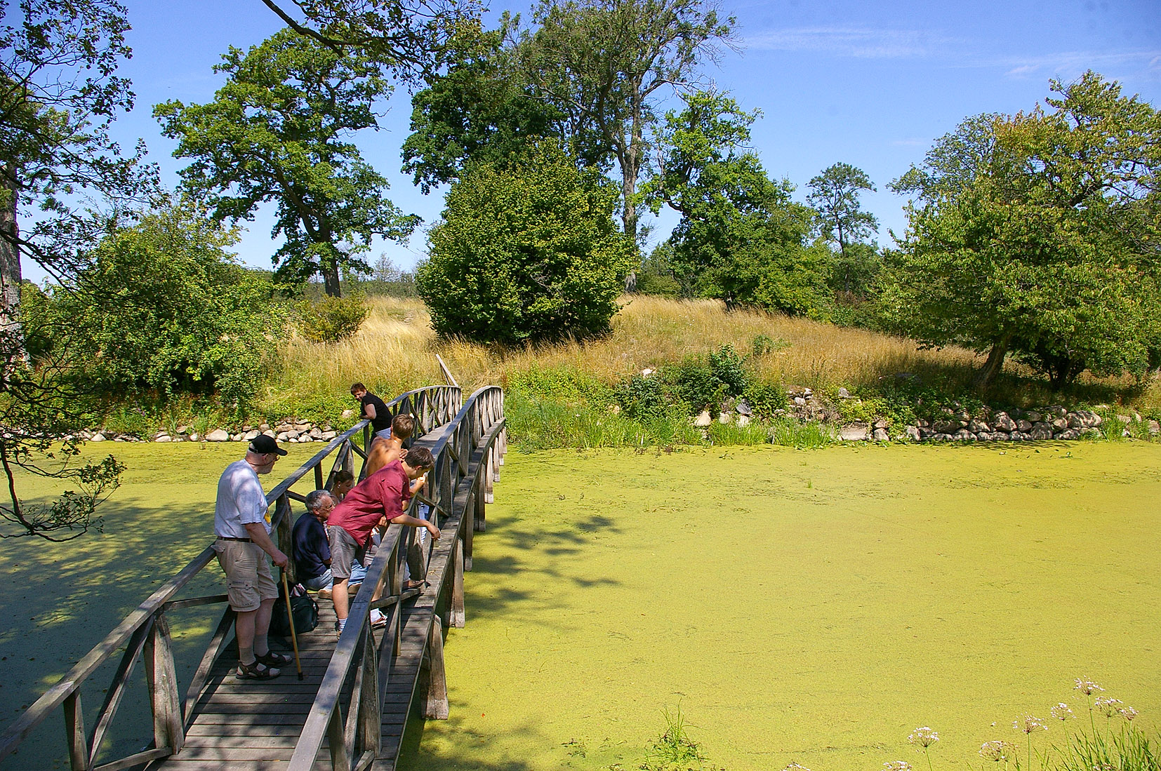 Borgruinen Stjärneholm nära Skurup i Skåne, Sverige.